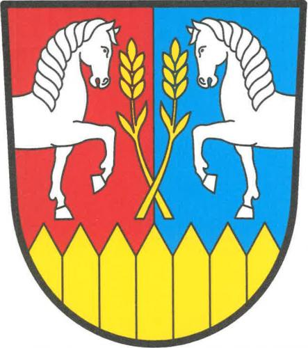 Hřebeč znak